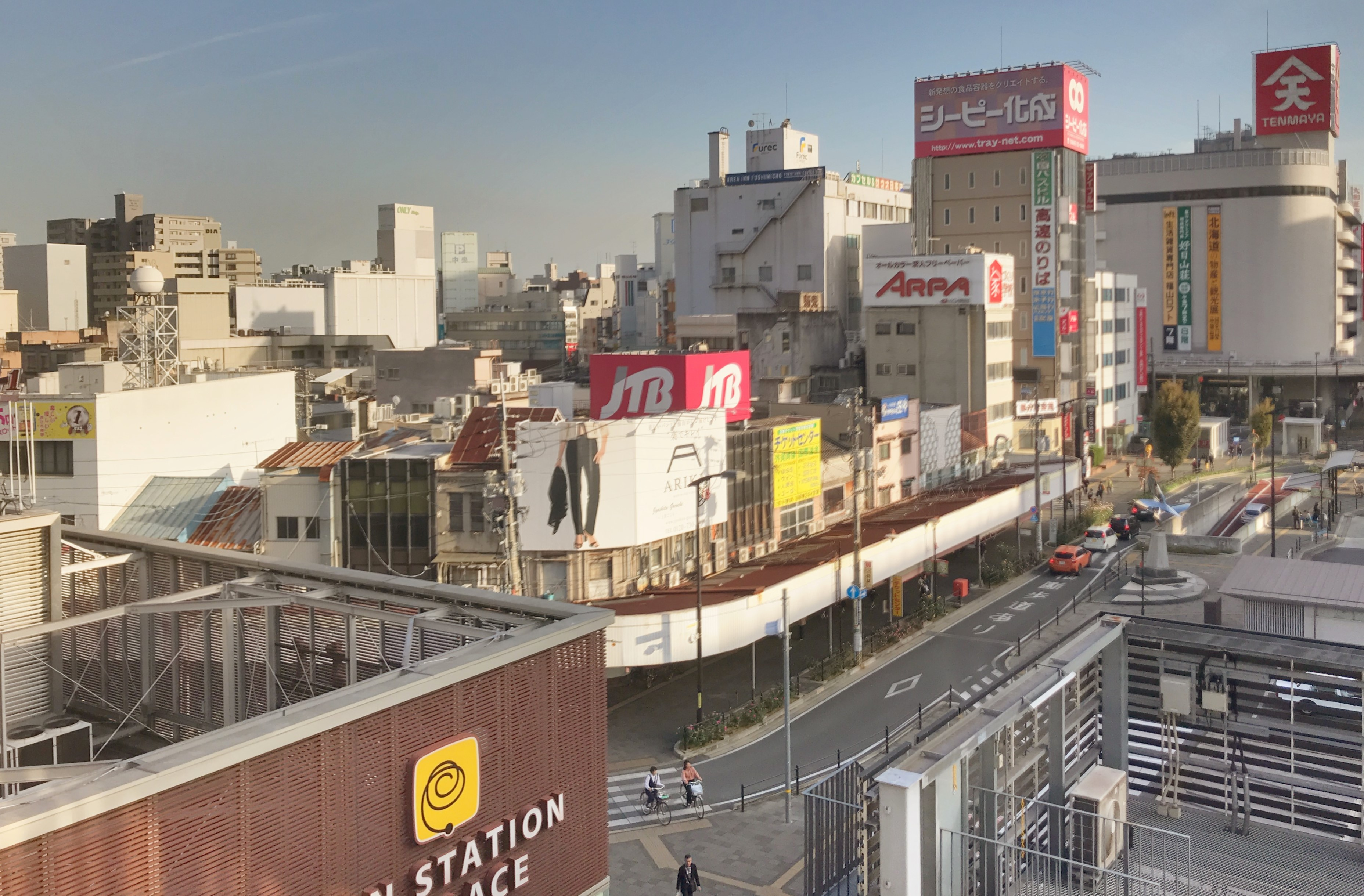 天満屋福山店（右奥）と、福山市伏見町（中央-左手前）